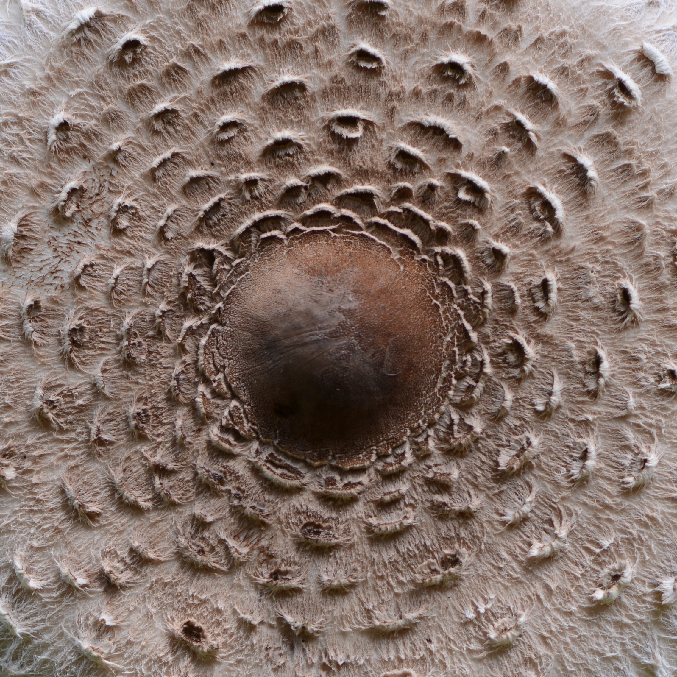 Der Parasol (Macrolepiota procera), oder Riesenschirmpilz in seiner natürlichen Umgebung. Gefunden ob Wolfurt in der Parzelle Bereuter.